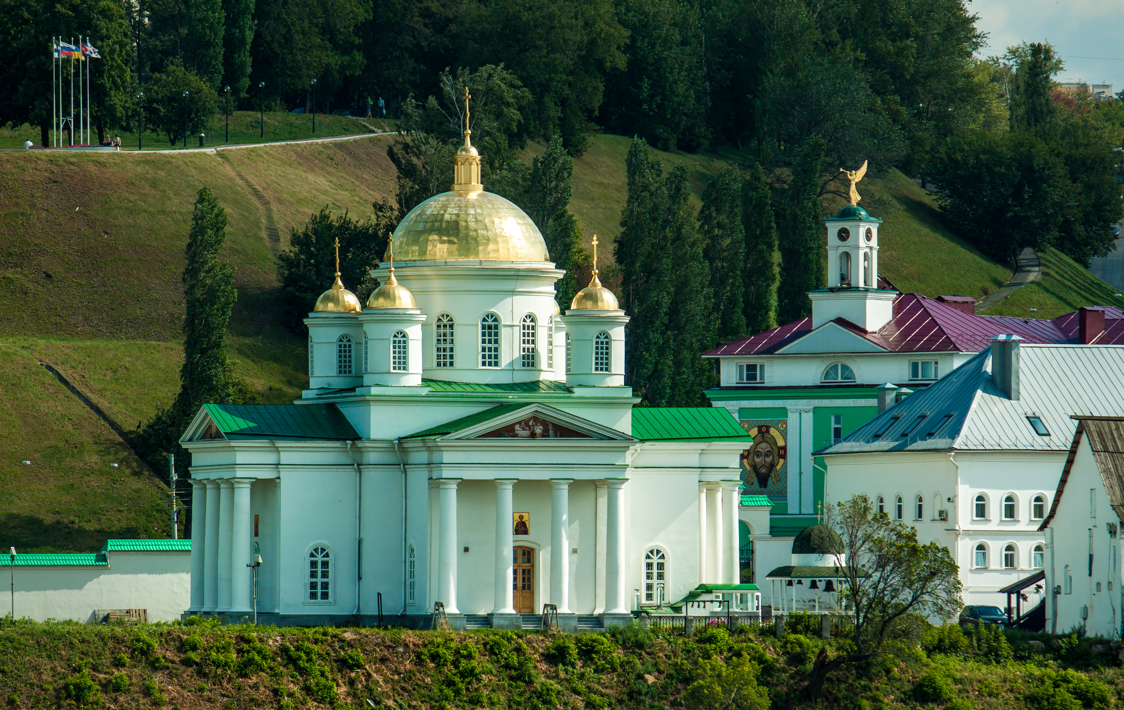 Благовещенский монастырь (Нижегородская область, Нижний Новгород, переулок Мельничный, 1)